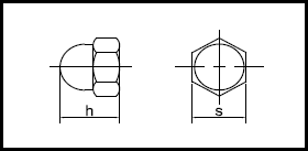 DIN 1587